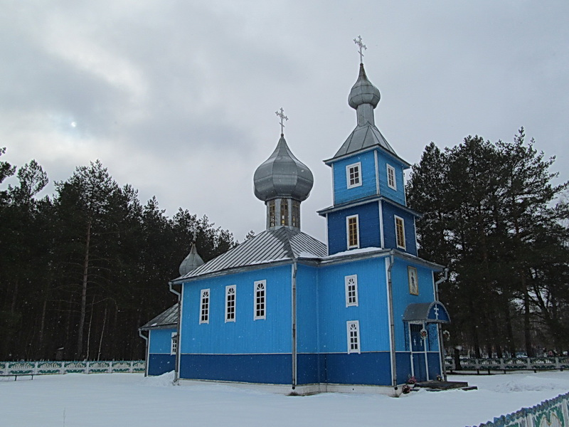 Лышча. Царква